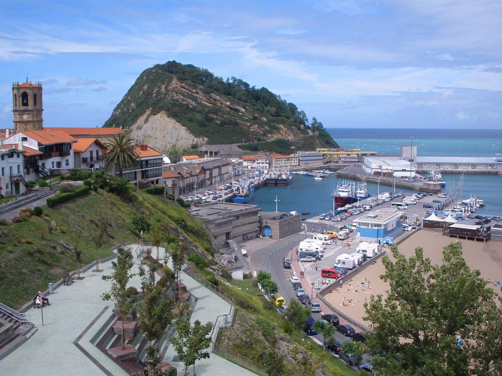 Puerto de Getaria